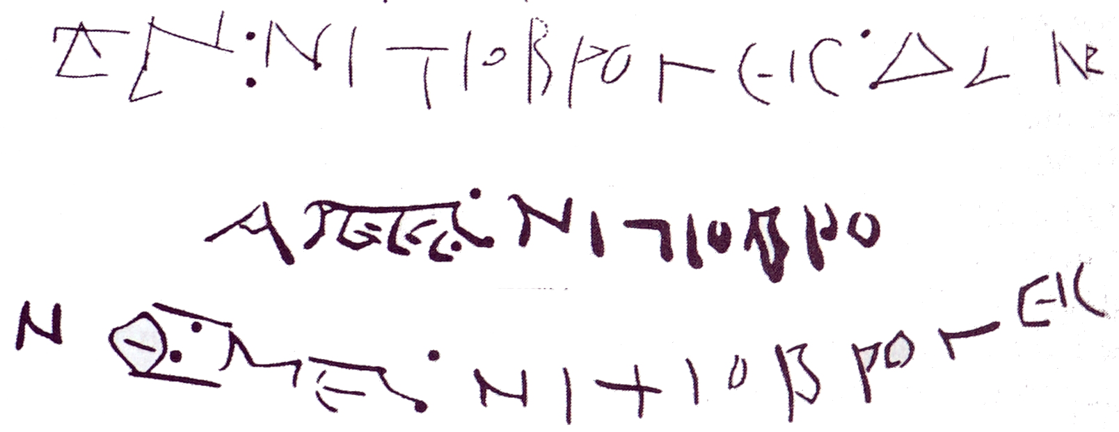 relevé de ces dessins.